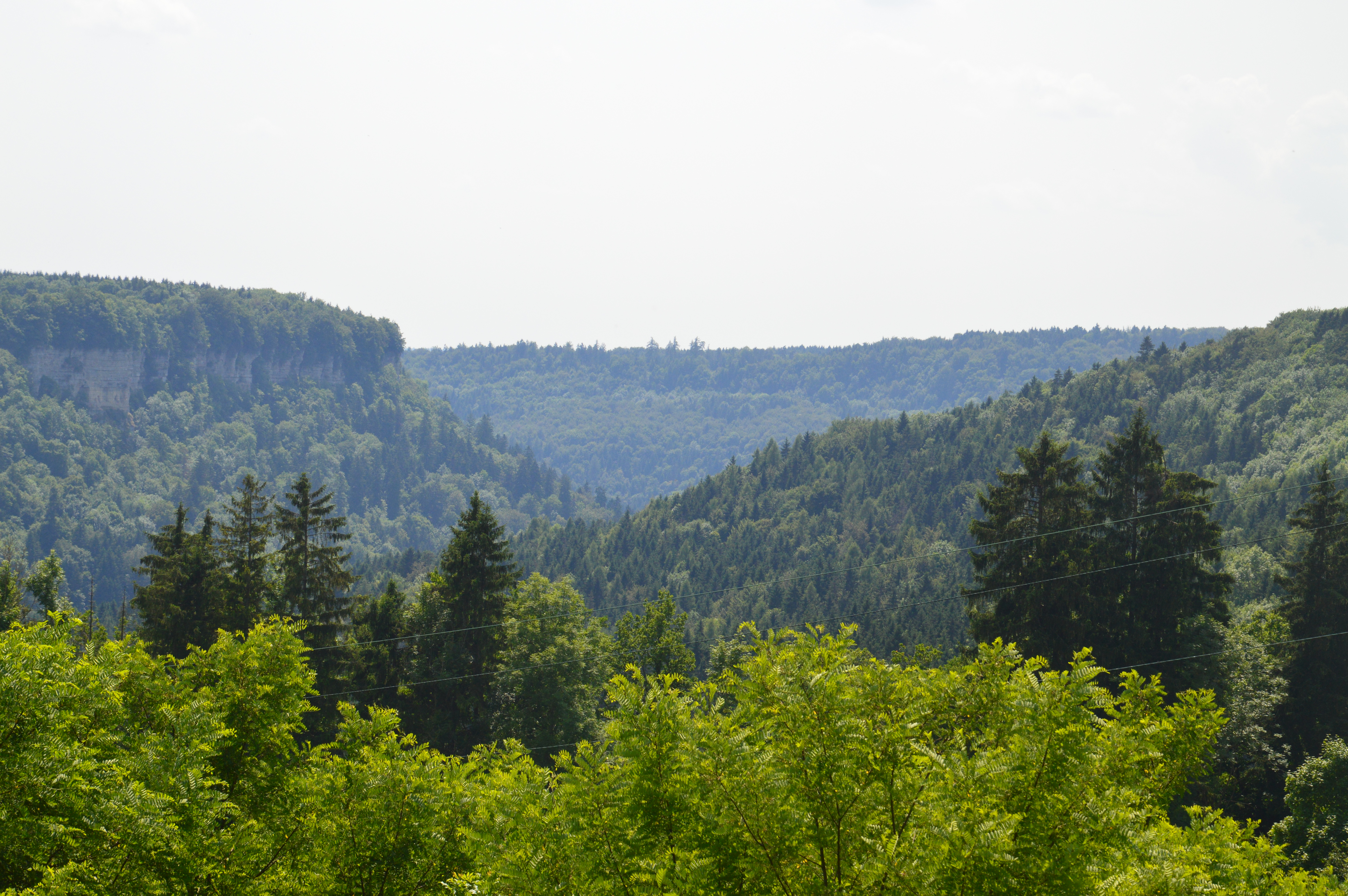 Bligg vo dè Südflankè vom Bühl am Wellblèchwäg absi i d Flühè yè bis zum Wyler.